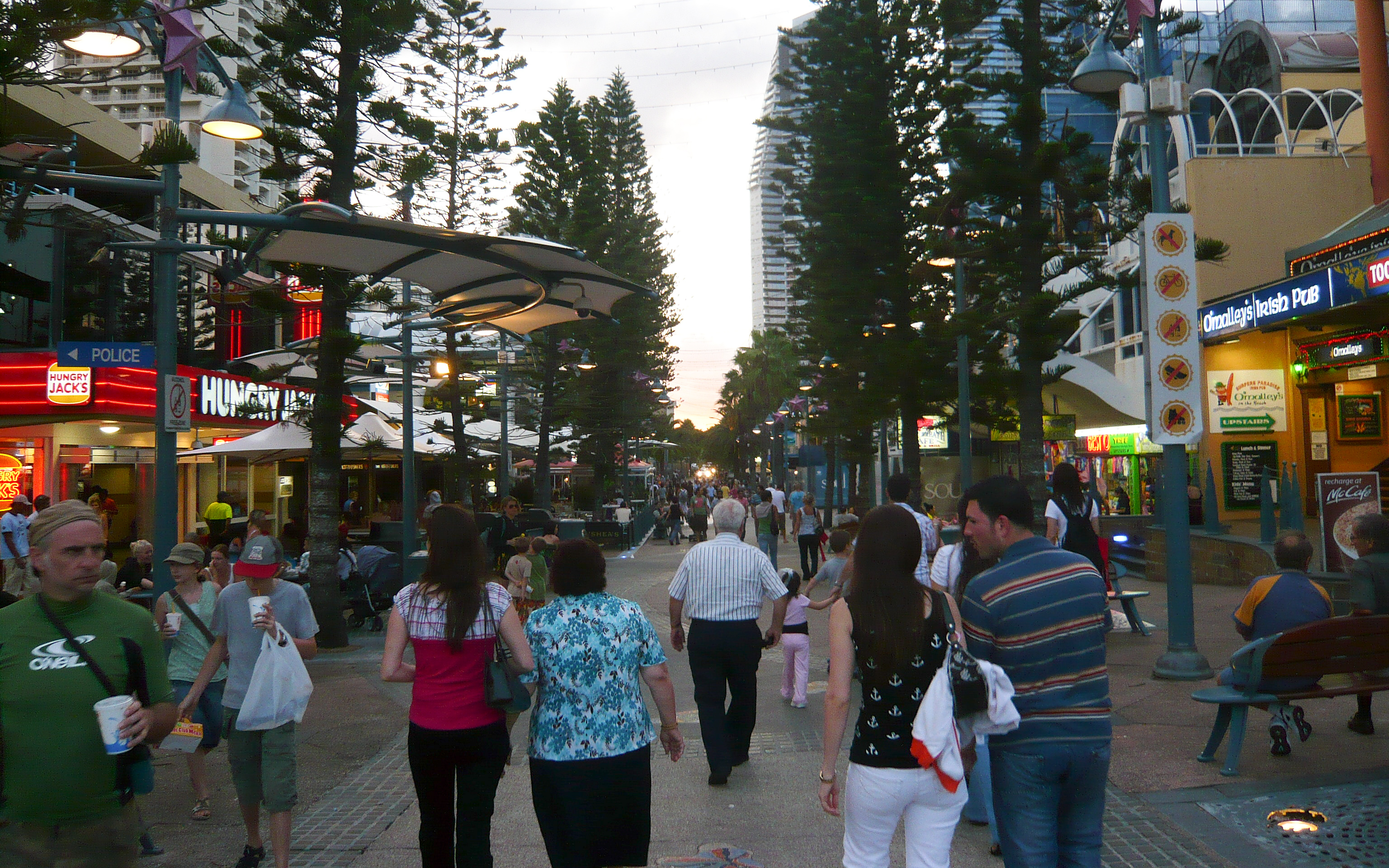 Cavill Avenue, Surfers Paradise